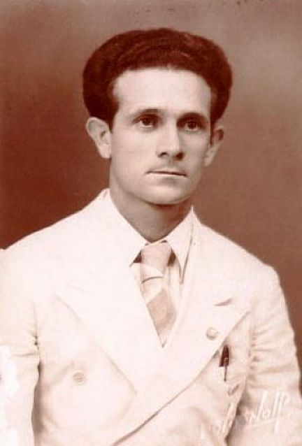 José Peirats Valls, Josep Peirats i Valls en catalan, né à La Vall d'Uixó (province de Castellón) le 15 mars 1908 et mort à Burriana (province de Castellón) le 20 août 1989, est un militant et un historien syndicaliste et anarchiste espagnol membre de la Confédération nationale du travail.